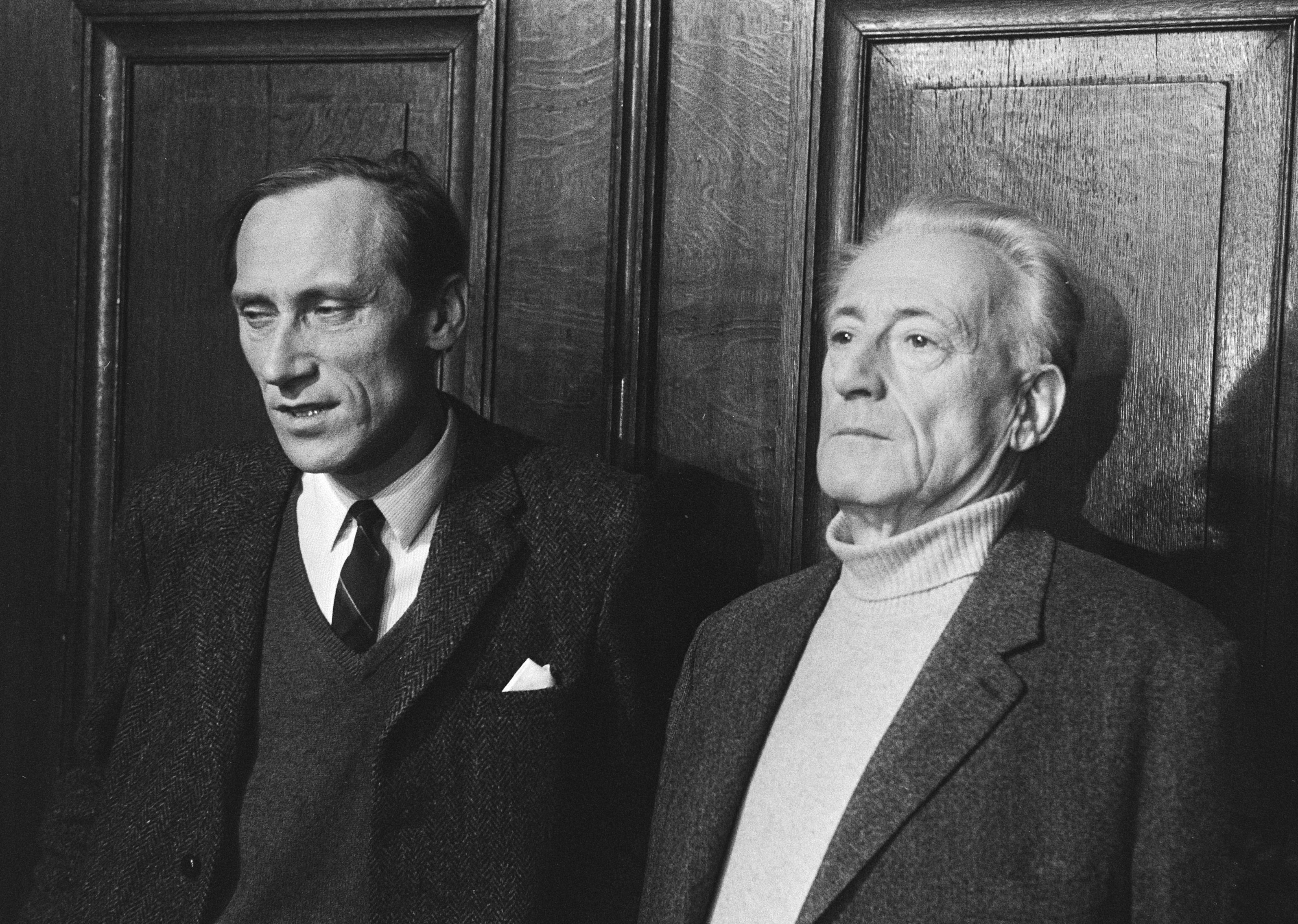 Discussiebijeenkomst in de aula van de Oude Lutherse Kerk te Amsterdam met de Poolse schrijver en filosoof Leszek Kolakowski en de Franse filosoof Henri Lefebvre.